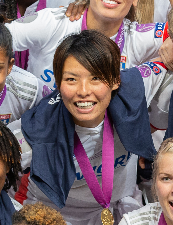 Fußball, Frauen, UEFA Women's Champions League, Olympique Lyonnais - FC Barcelona; Olympique Lyonnais feiert den erneuten Titel; Jubel, celebration